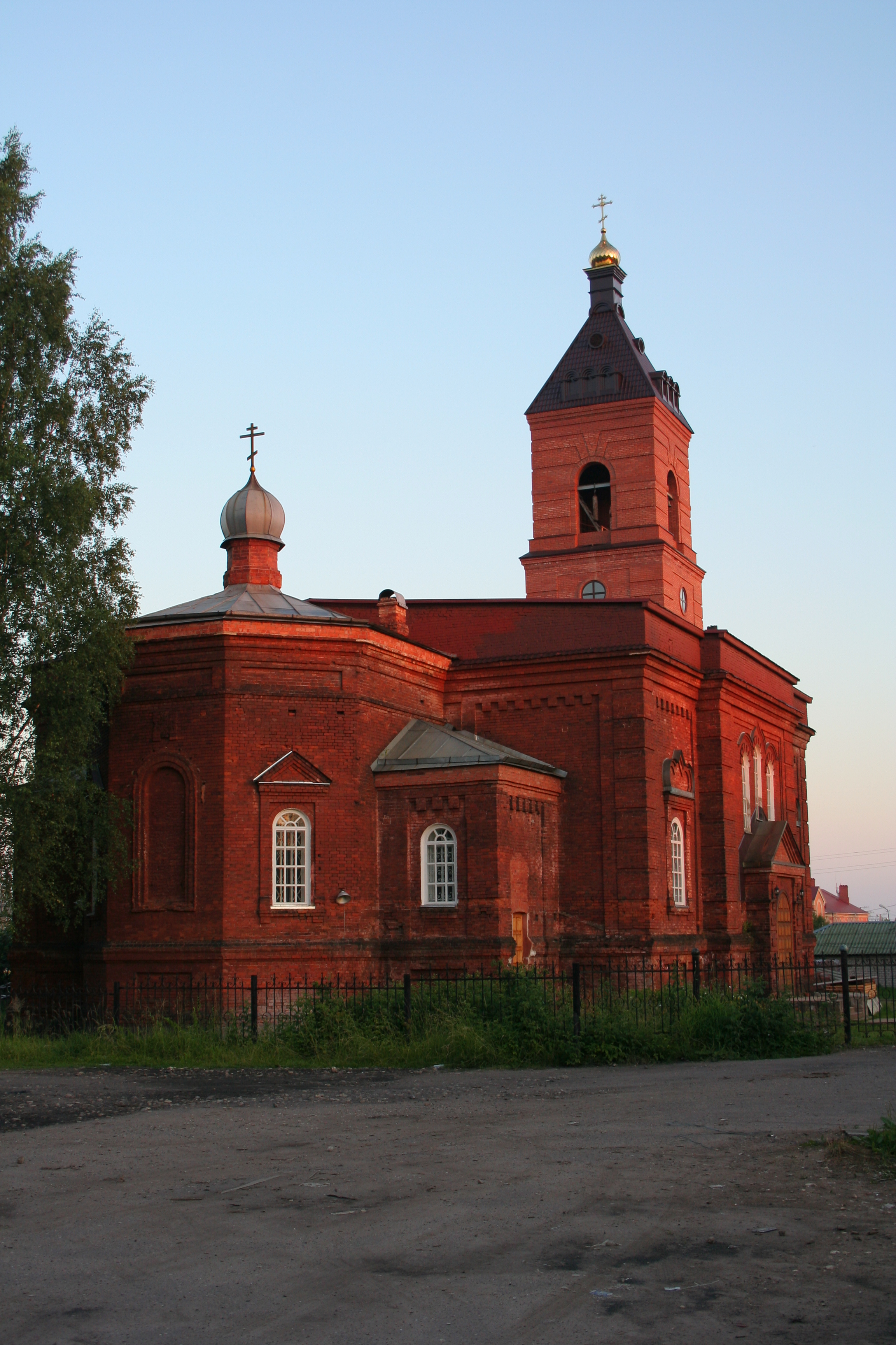 Stadt Okulowka (Oblast Nowgorod, Russland). Alexander-Newski-Kirche.